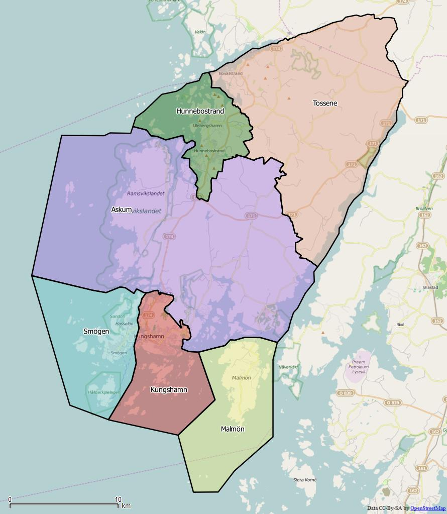 Distriktsindelningen i Sotenäs kommun World file: 46.29740035882946358 0 0 -46.29740035882946358 1238759.69165802234783769 8074427.69418456684798002